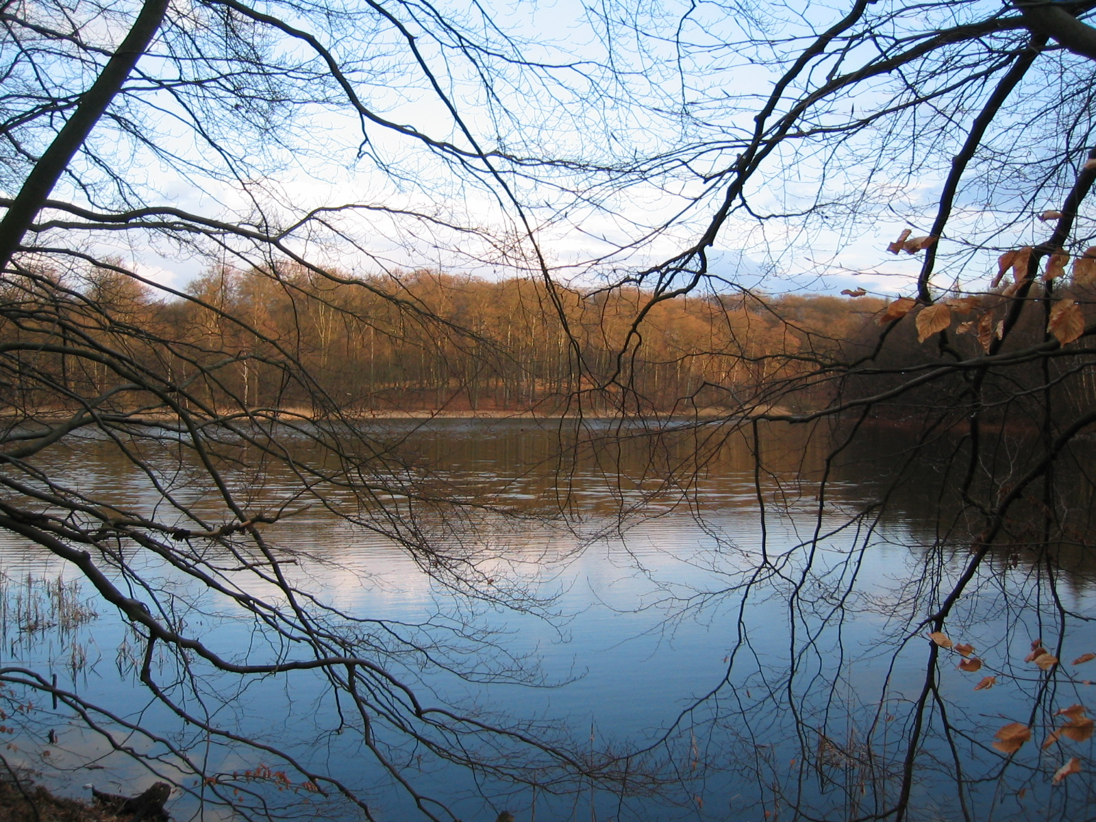 Kespersee bei Melzow direkt an der BAB 11.